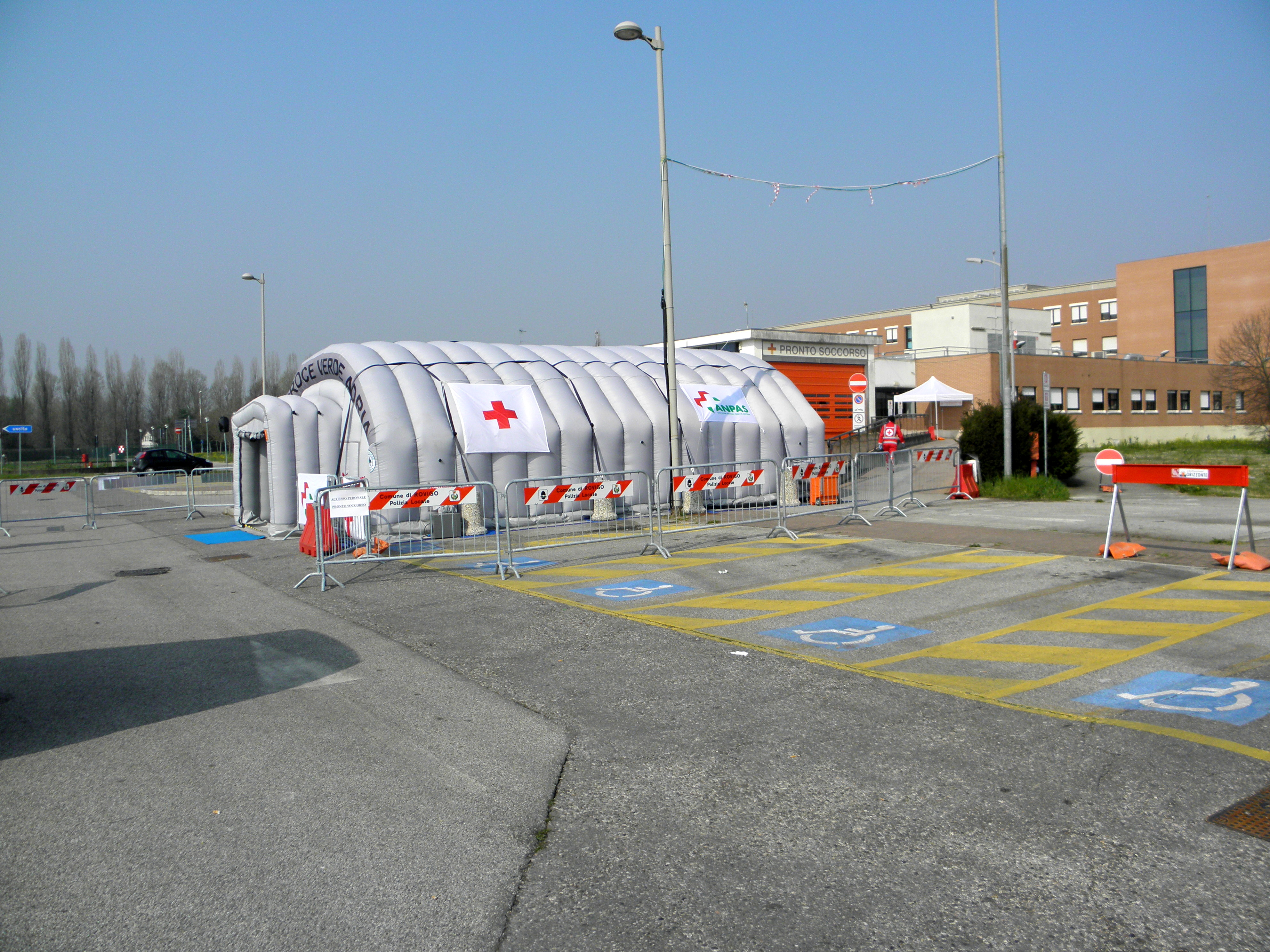 Ospedale Santa Maria della Misericordia di Rovigo, le tende istallate per l'accesso al Pronto Soccorso per fronteggiare l'epidemia di COVID-19 del 2019-2020. (12 marzo 2020)